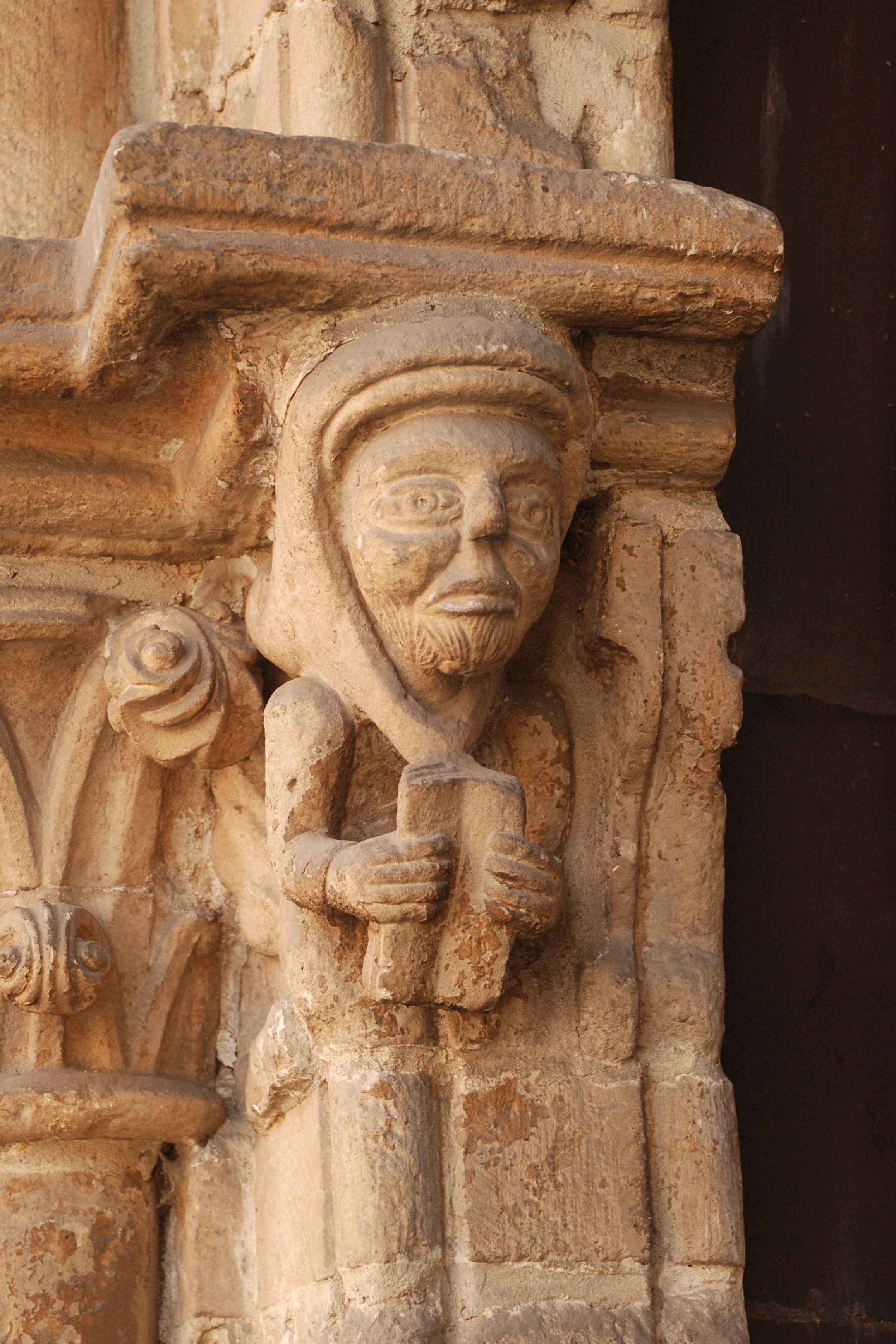 Belgique - Louvain - Chapelle de la Porte Romane